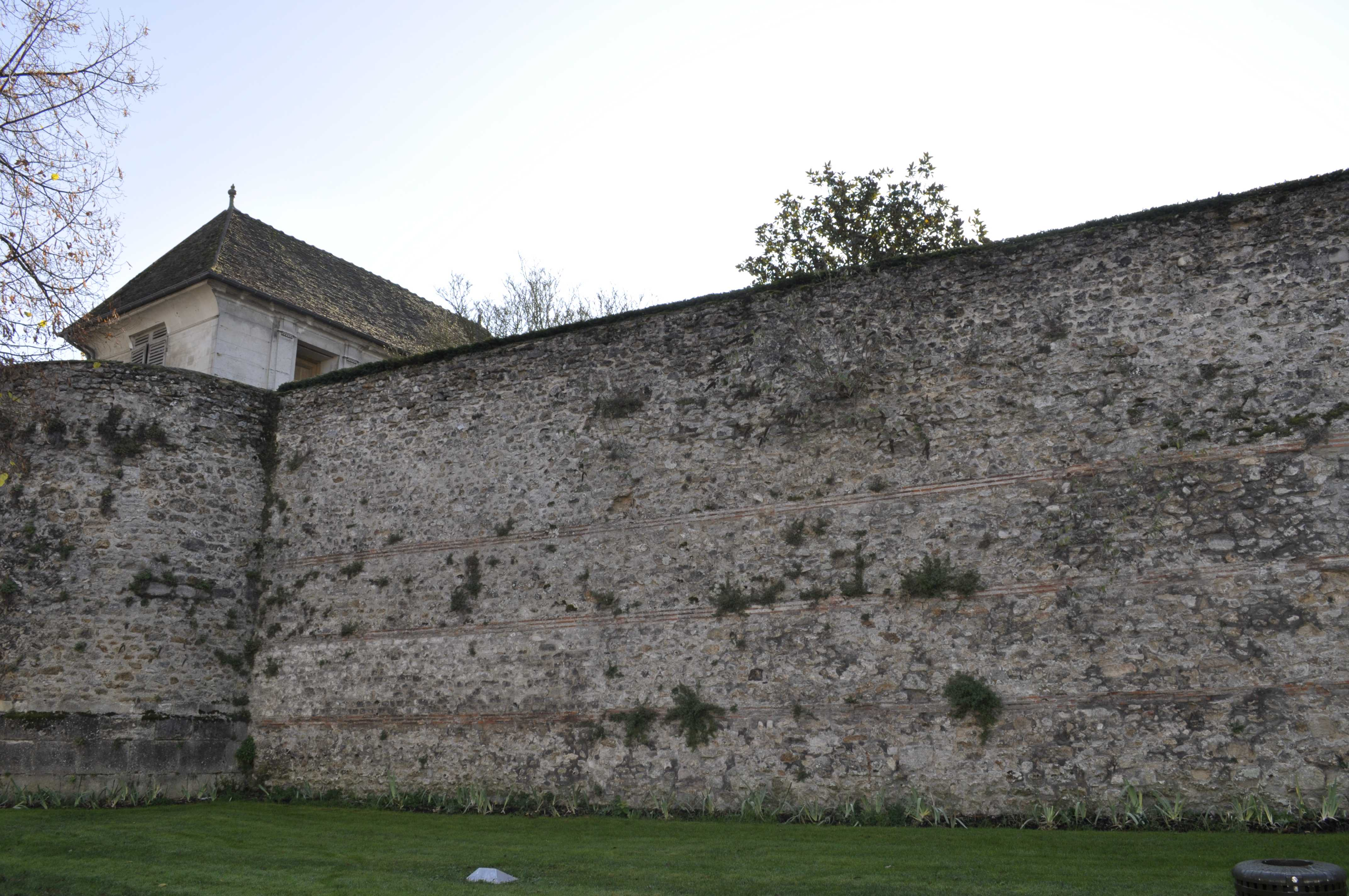 Remparts de Meaux, pavillon Bossuet de 1660, classé M.H. par arrêté du 15 juin 1910.